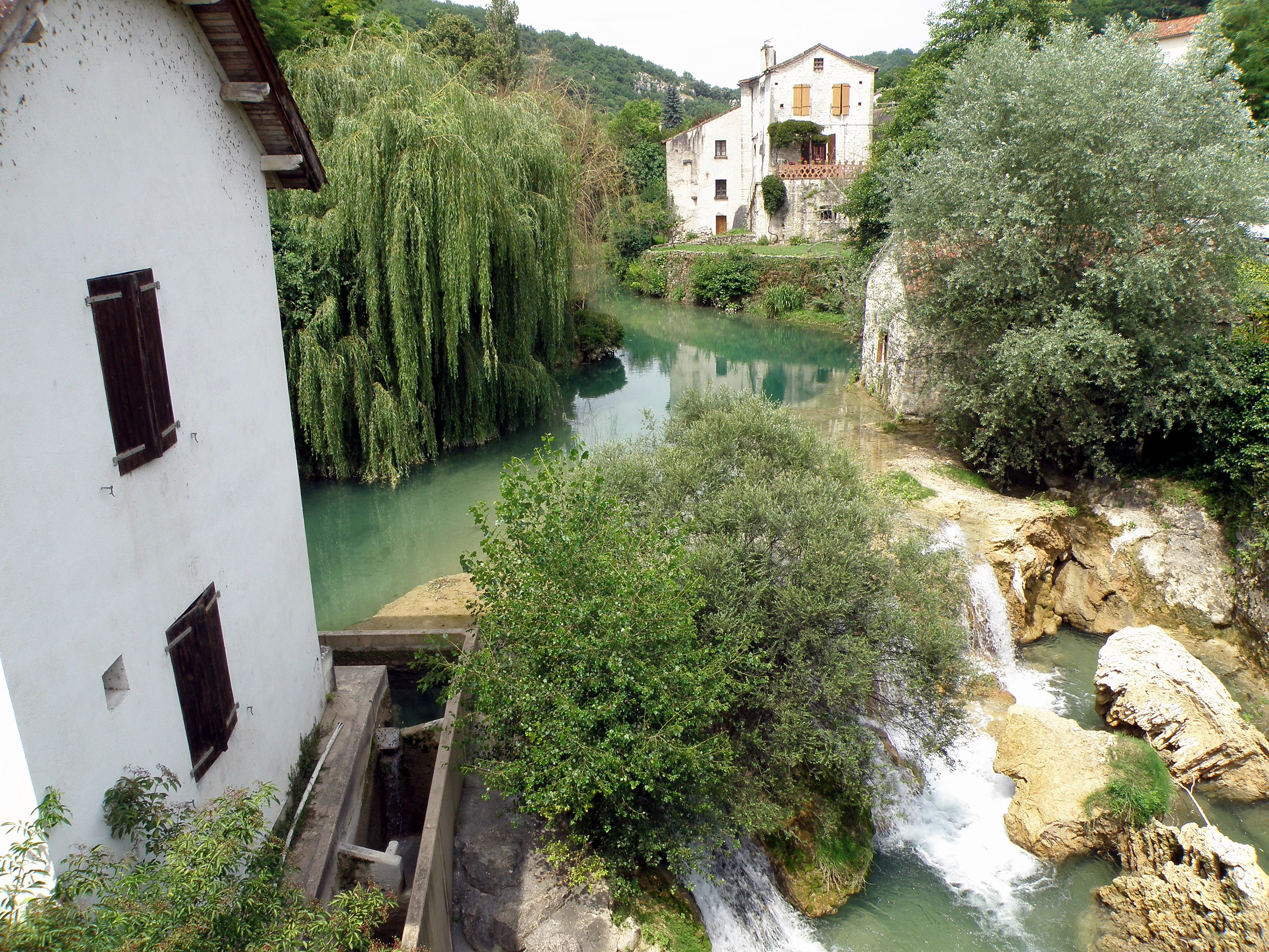 Vers, comm. et village du départ. du Lot, au confluent du Lot et du Vers. La rivière Vers près des moulins (visibles à gauche), avec cascade.